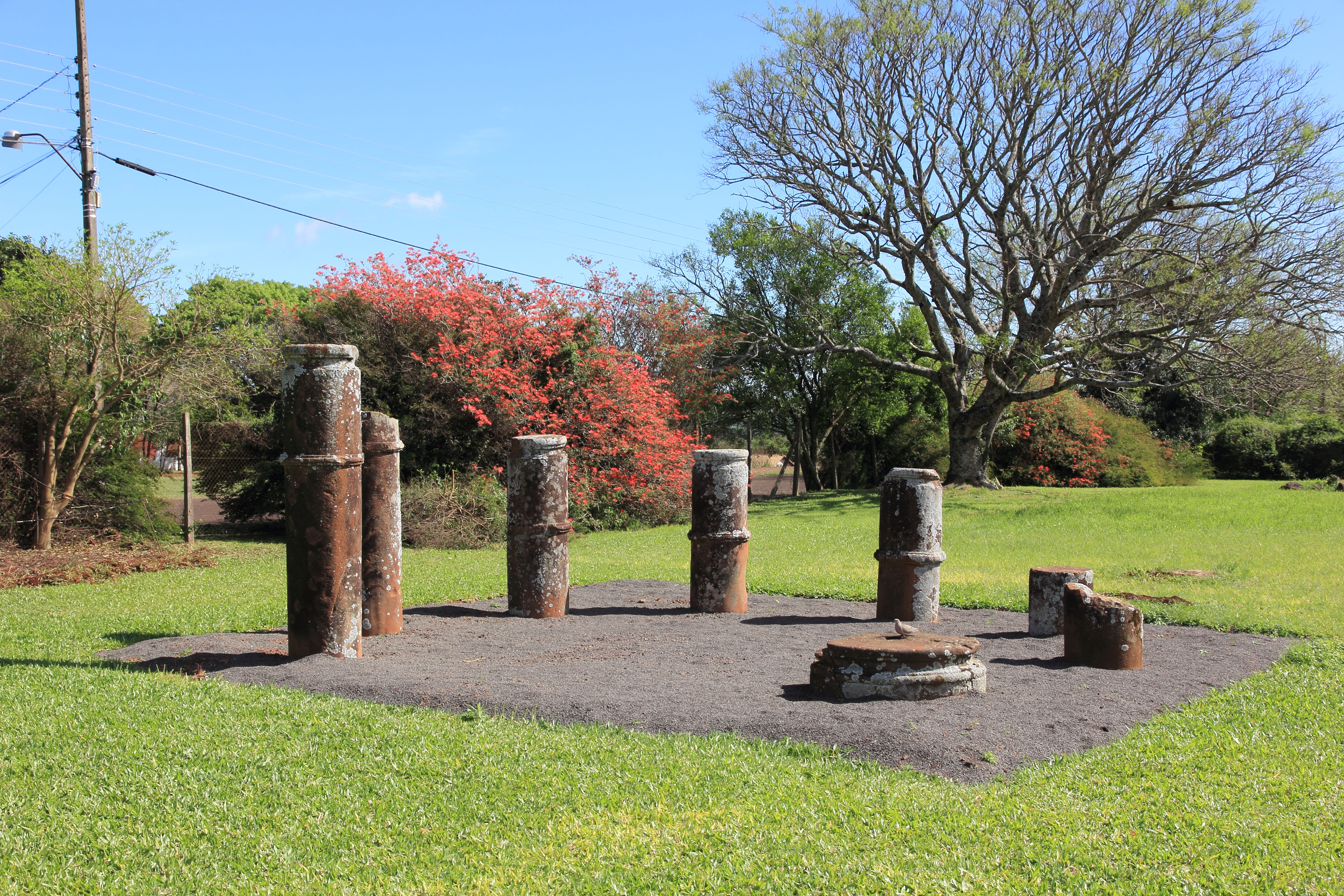 Sítio Arqueológico de São Miguel Arcanjo em São Miguel das Missões, RS.